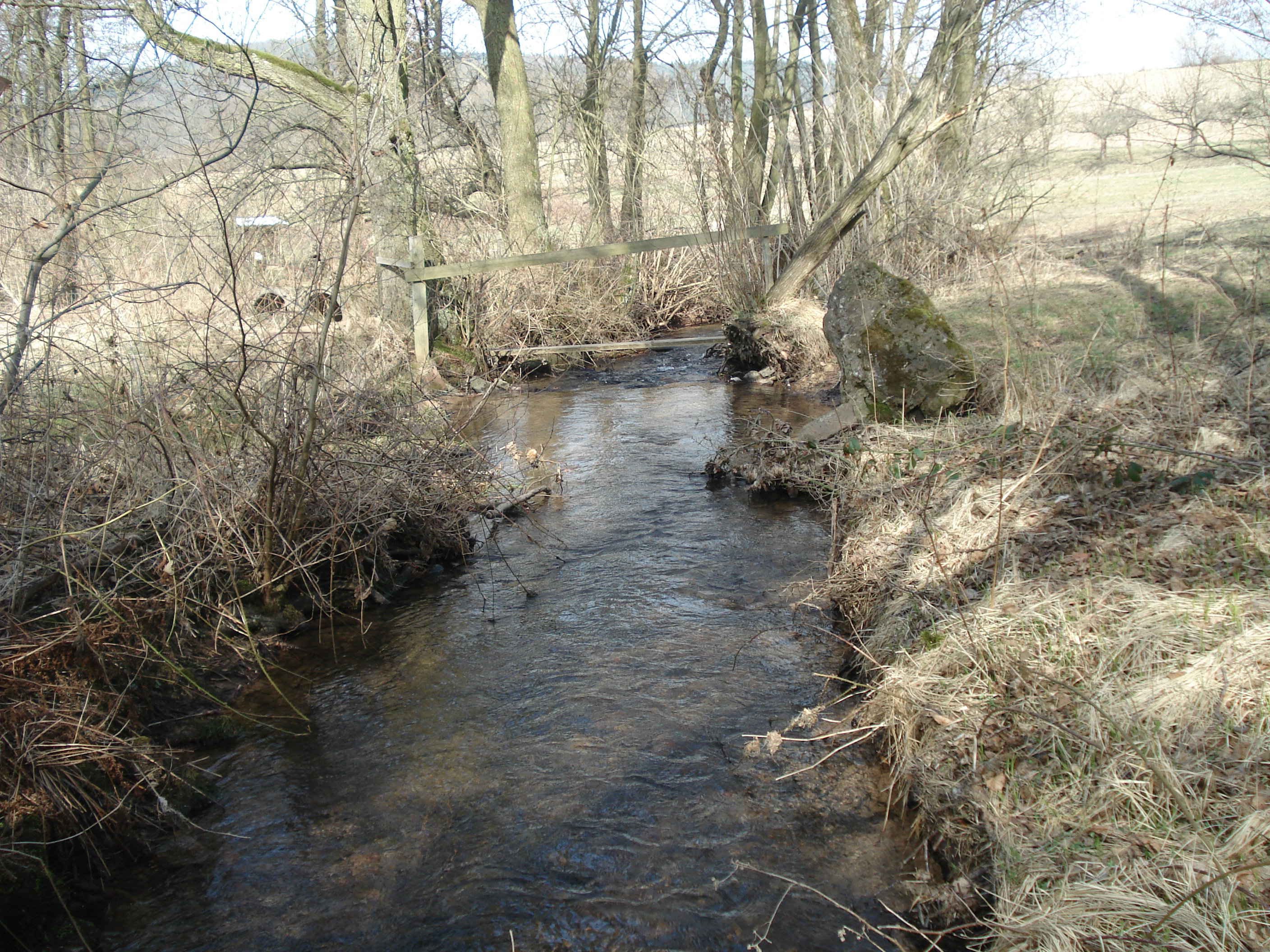 Die Kleine Kahl vor Kleinkahl